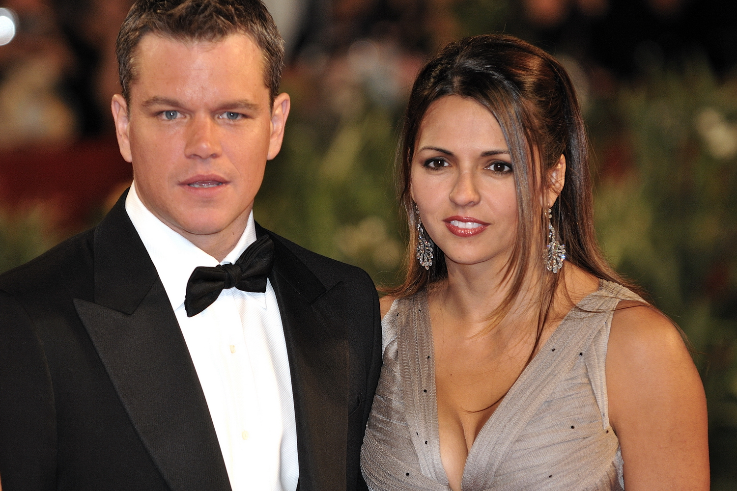 66ème Festival du Cinéma de Venise (Mostra), 6ème jour (07/09/2009) Tapis rouge avec Matt Damon (et sa femme) avec Steven Soderbergh pour le film : The Informant